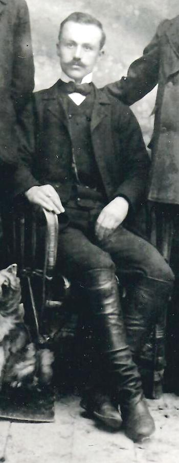 Портрет на гъркоманския андарт Лазарос Цамис.